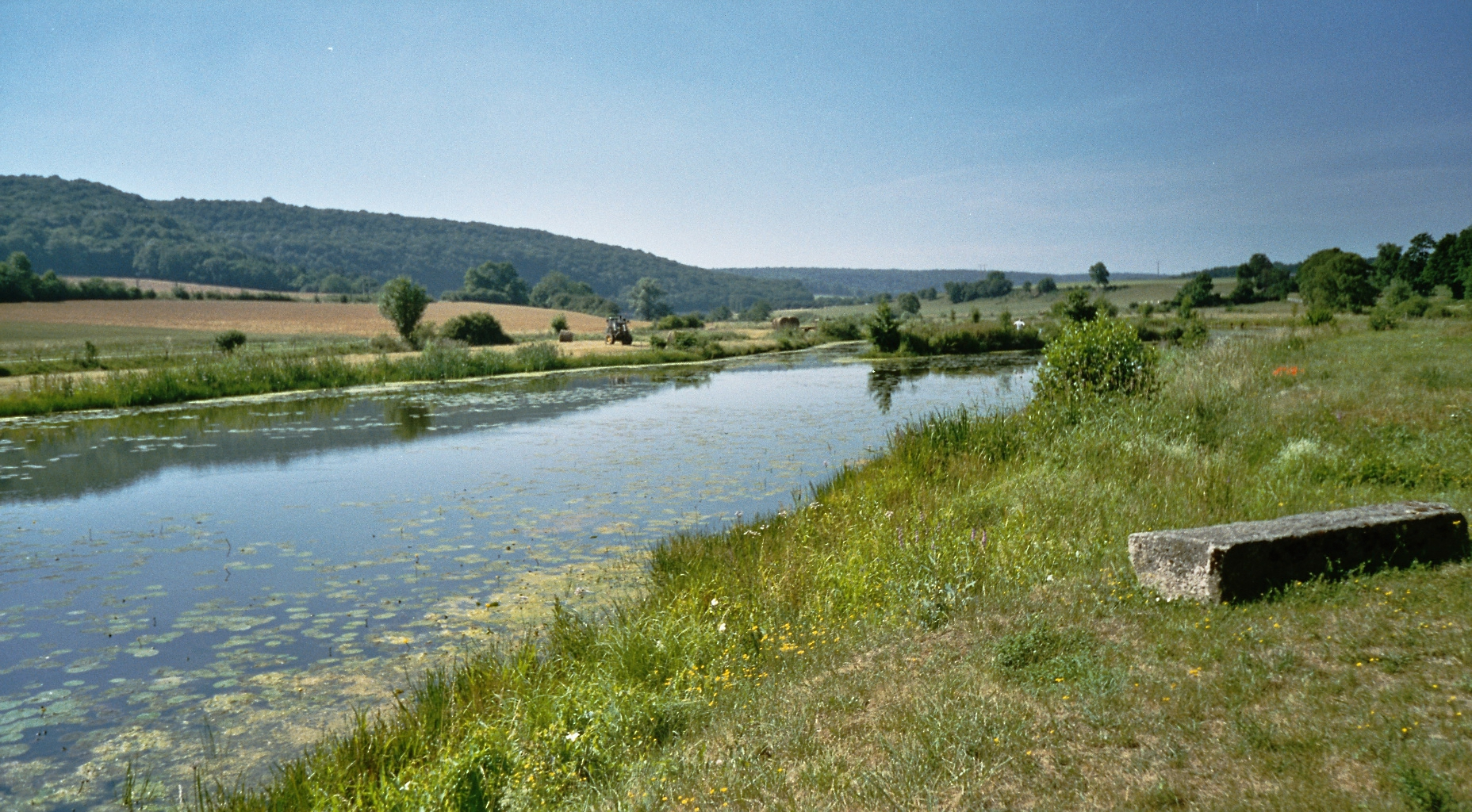 Bazoilles sur Meuse-Vosges-France